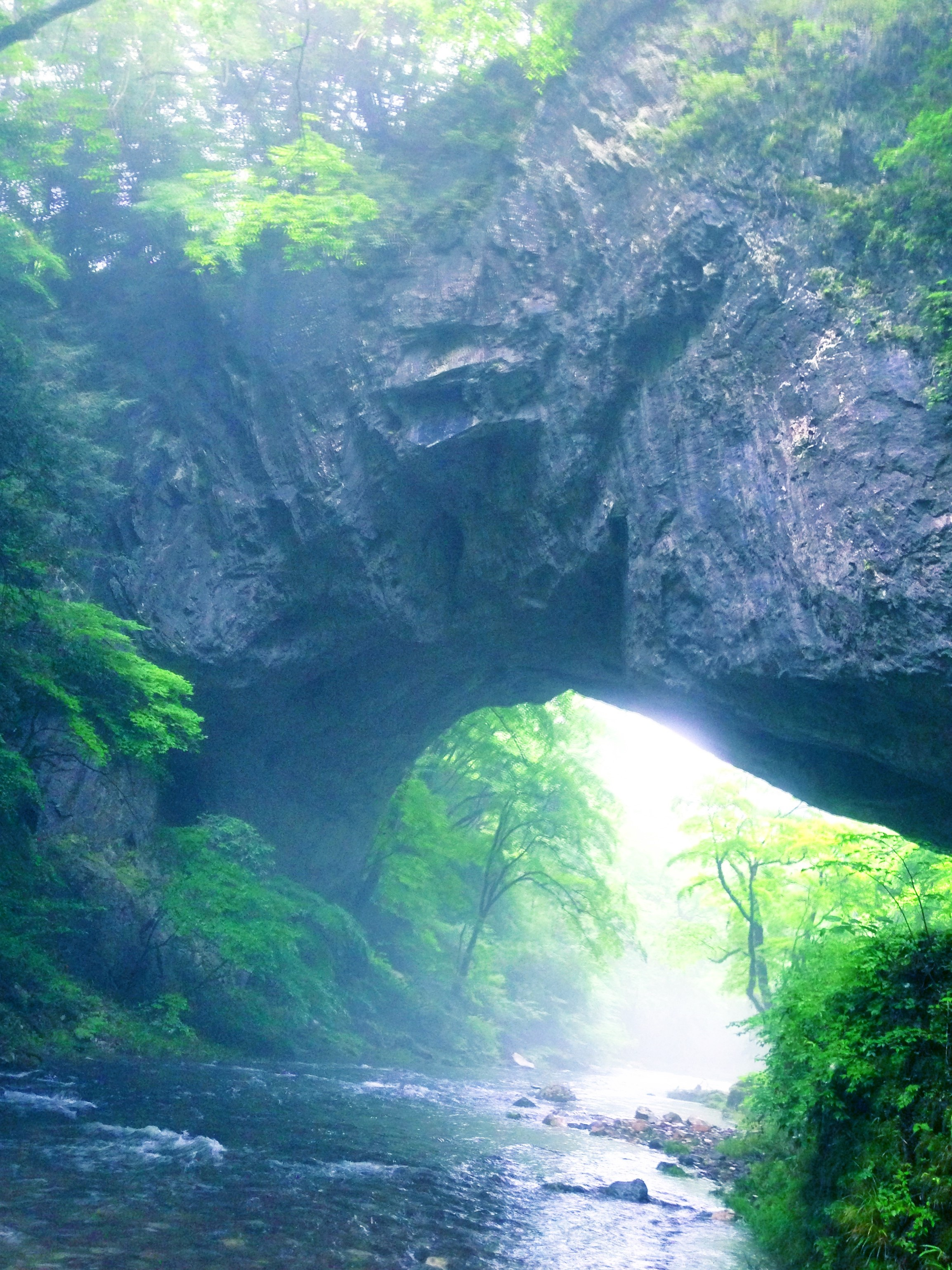 帝釈峡の雄橋（下流側より）